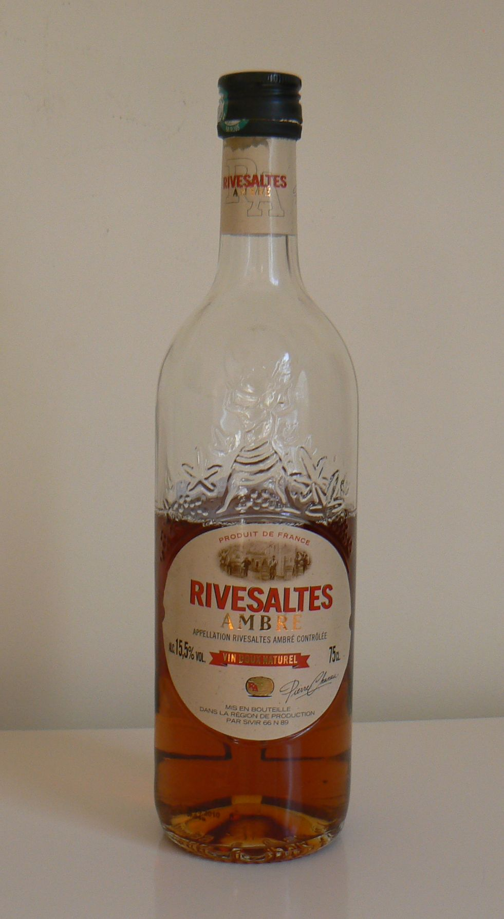 Ampolla de vi dolç de Rivesaltes (Catalunya Nord), diferent del muscat (o moscatell) de Rivesaltes.